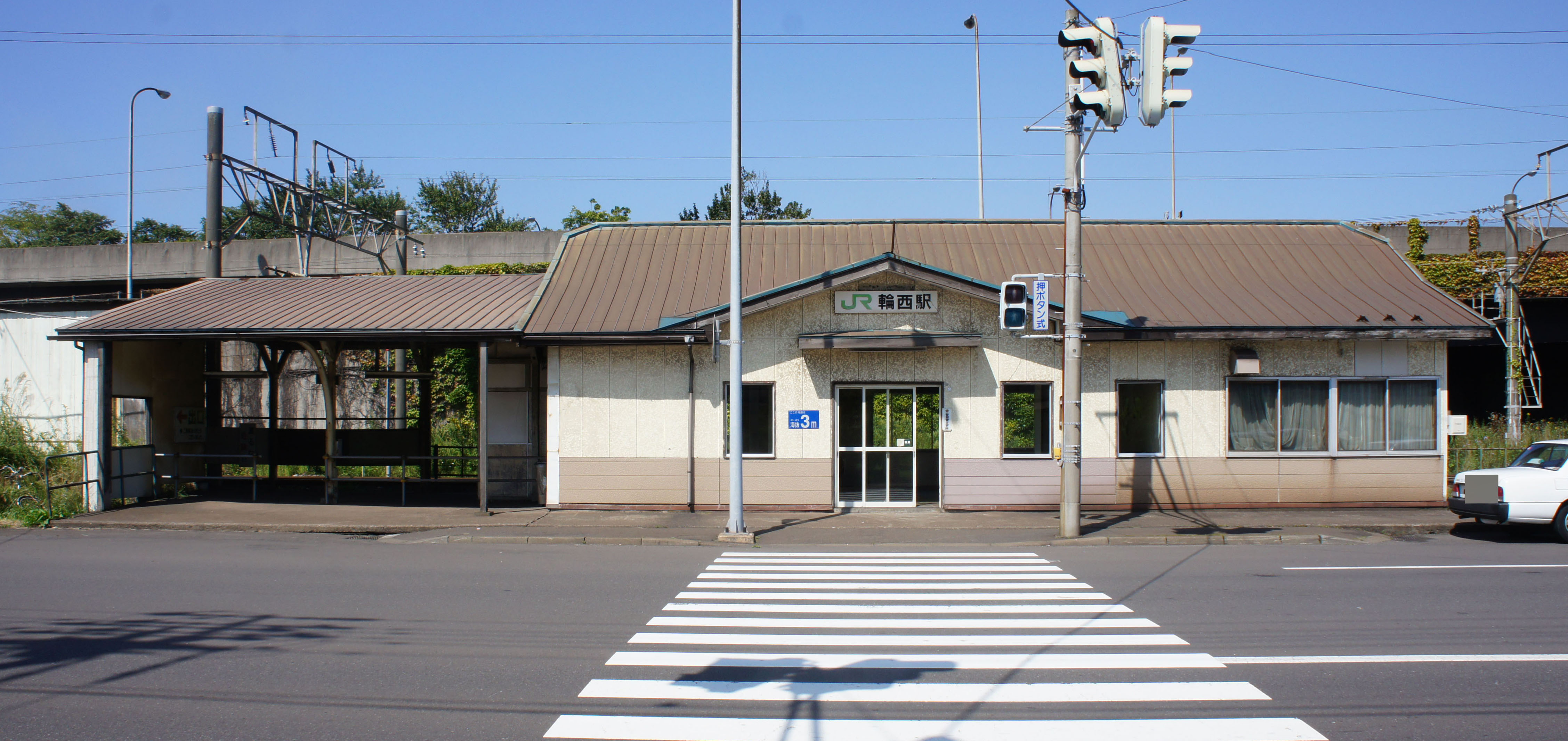 JR室蘭本線・輪西駅の駅舎